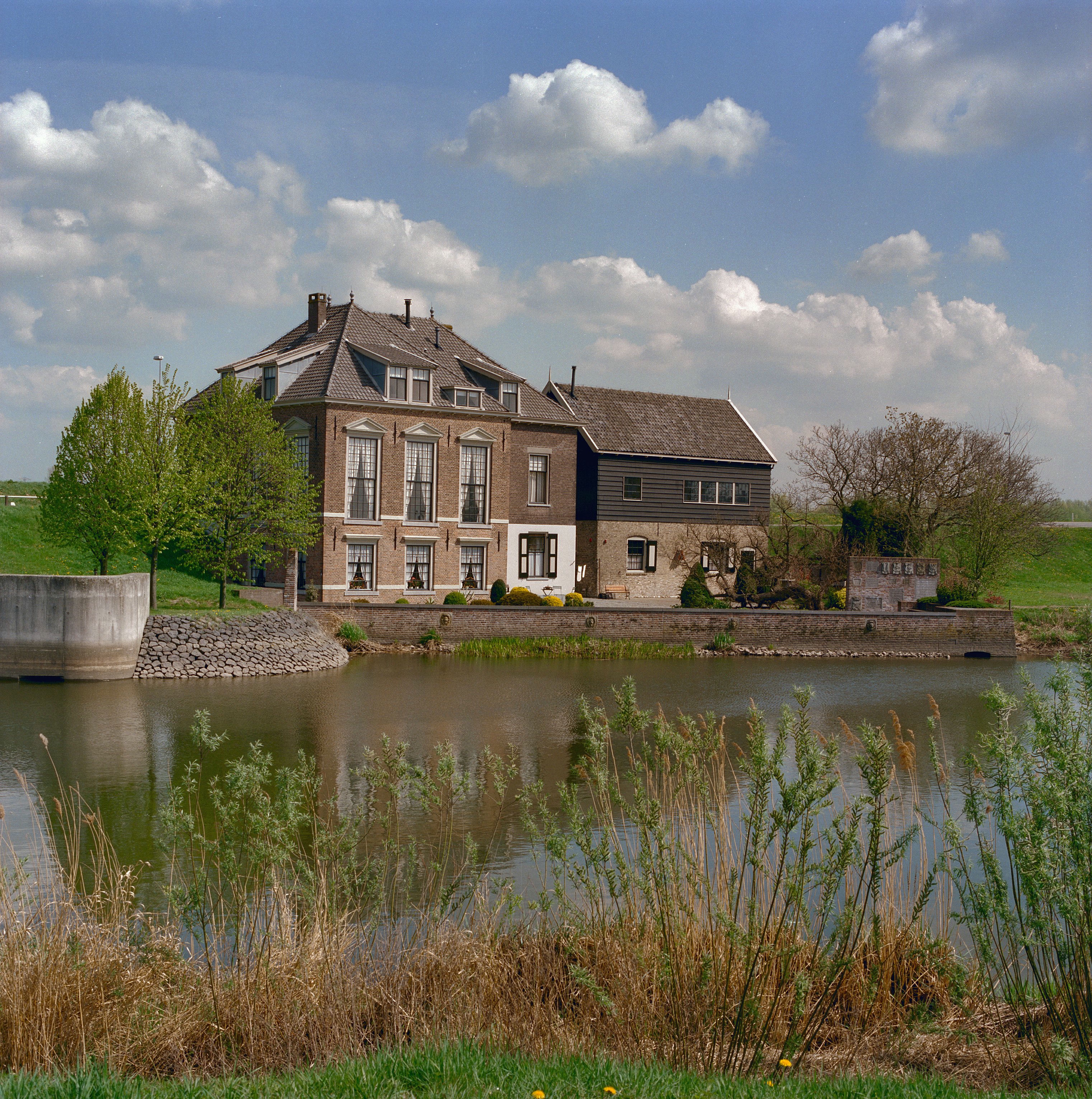 Gemeenlandshuis van de Overwaard: Overzicht (opmerking: Gefotografeerd voor plaatsing op de Werelderfgoedlijst)